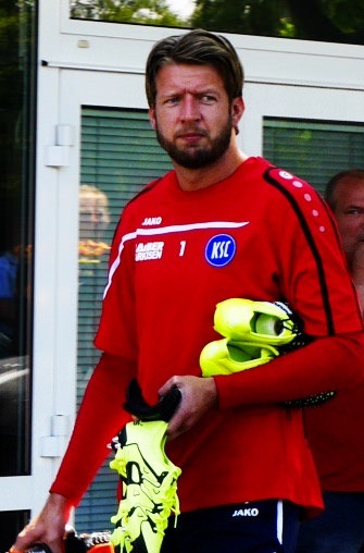 Trainingsauftakt beim KSC